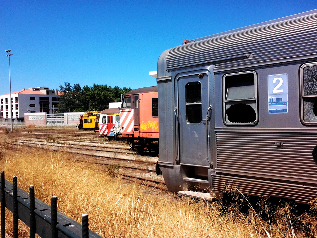 Comboios abandonados na Estação de Barreiro A.